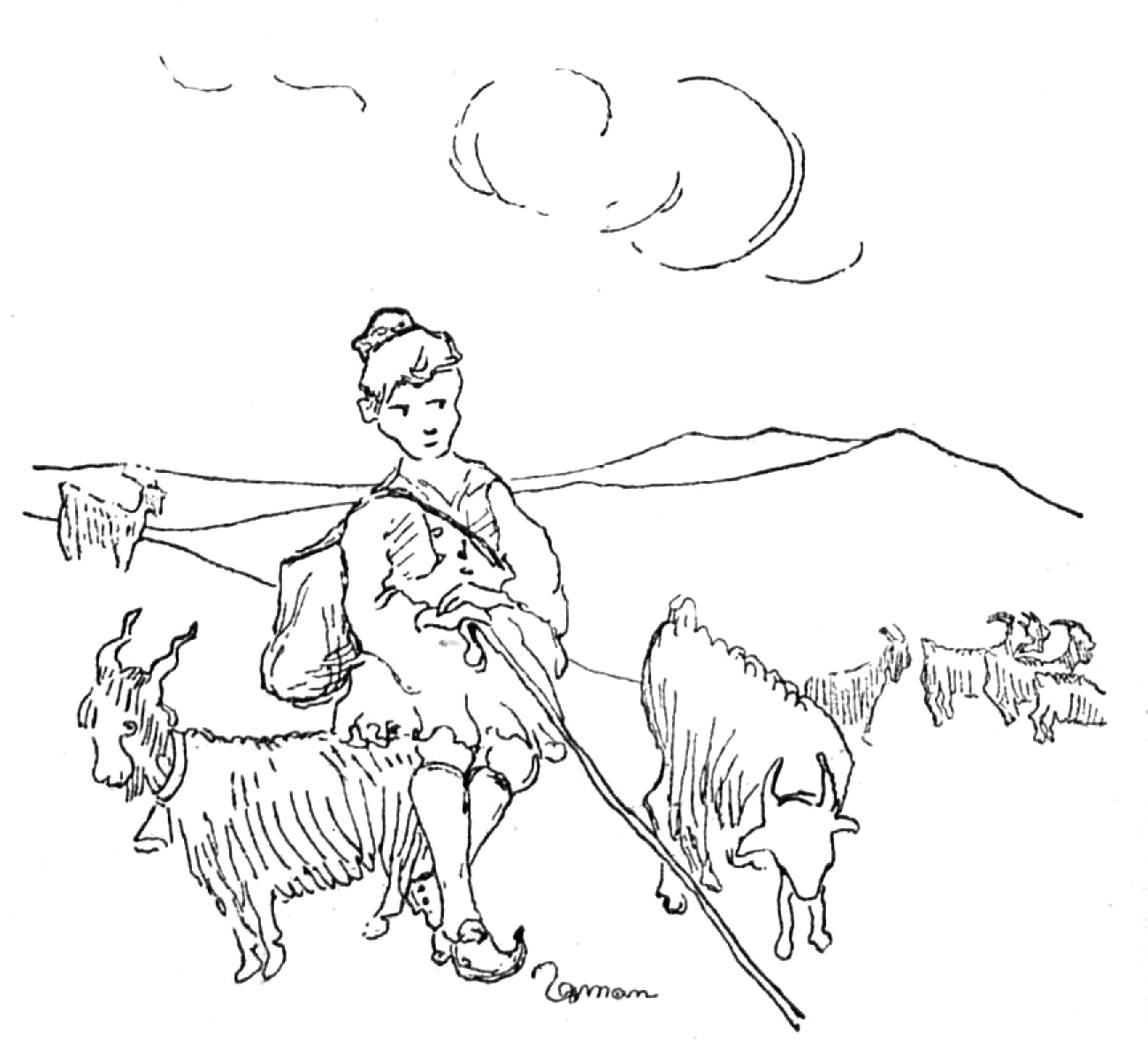 enfant valaque berger avec chèvres